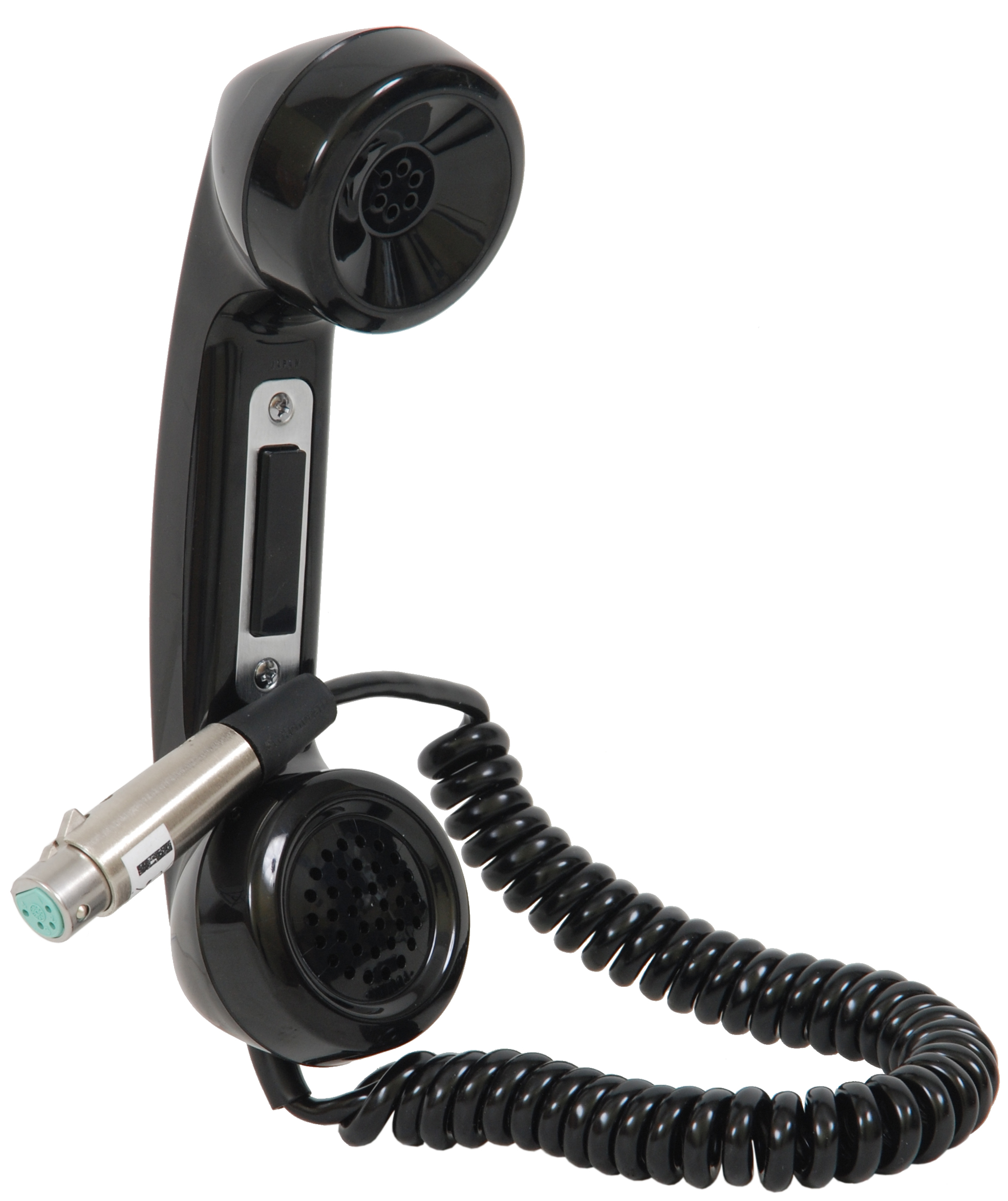 Słuchawka HS-6 Phone Receiver firmy Clearcom